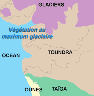 Description : Carte de France limites des végétations au maximum glaciaire au Paléothique Supérieur Réalisation : Pline personnelle Date : 2005